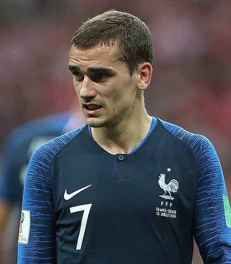 Уилл Смит, Гризманн, Модрич и кубок мира - в Москве прошёл финал ЧМ-2018